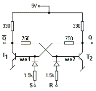 Przerzutnik RS